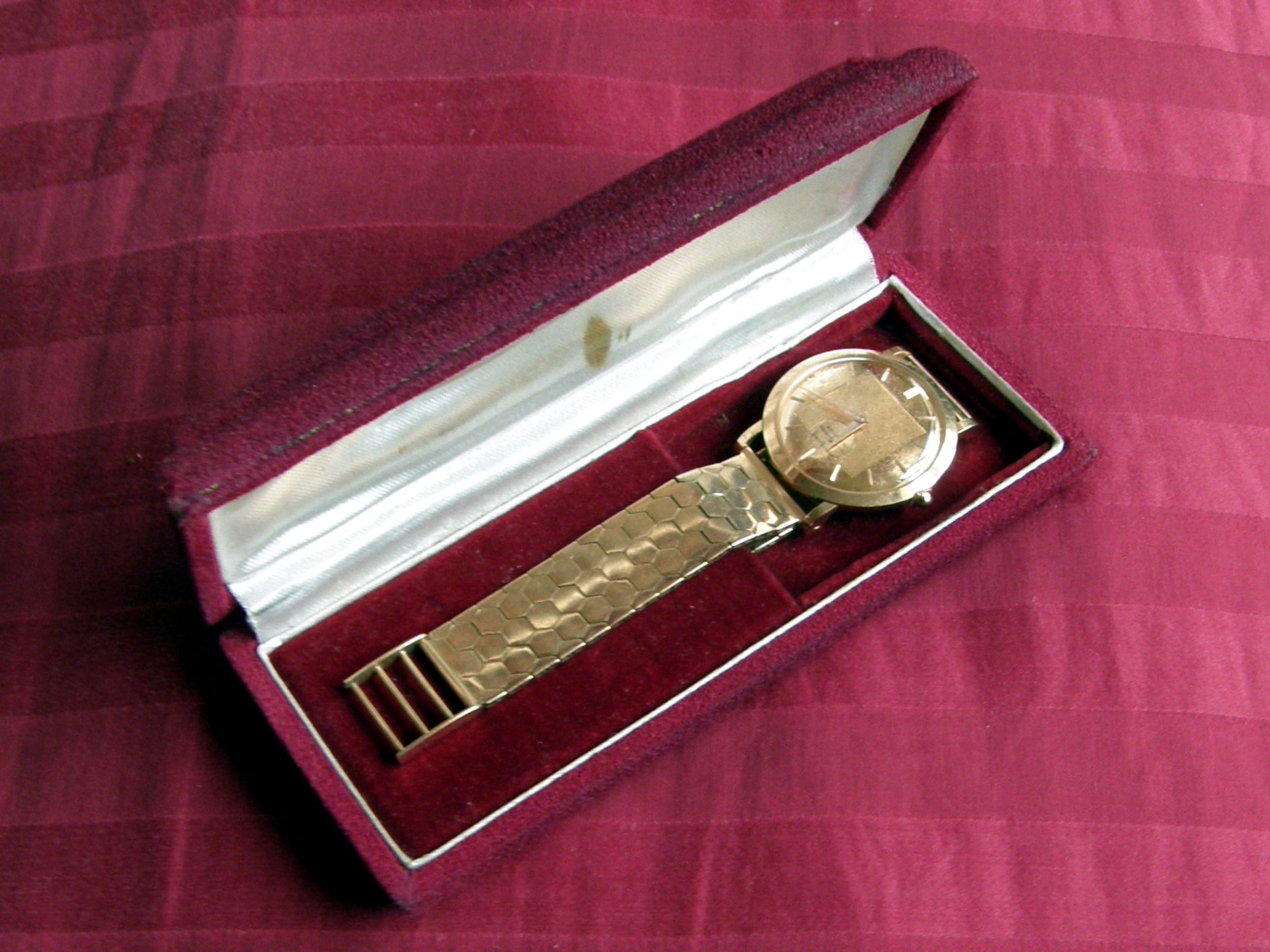 Montre Movado bracelet et boîtier en or, vers 1950. Dans son écrin d'origine en bois et tissus.